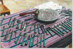 Herrameintas empleadas para trabajar el papel picado